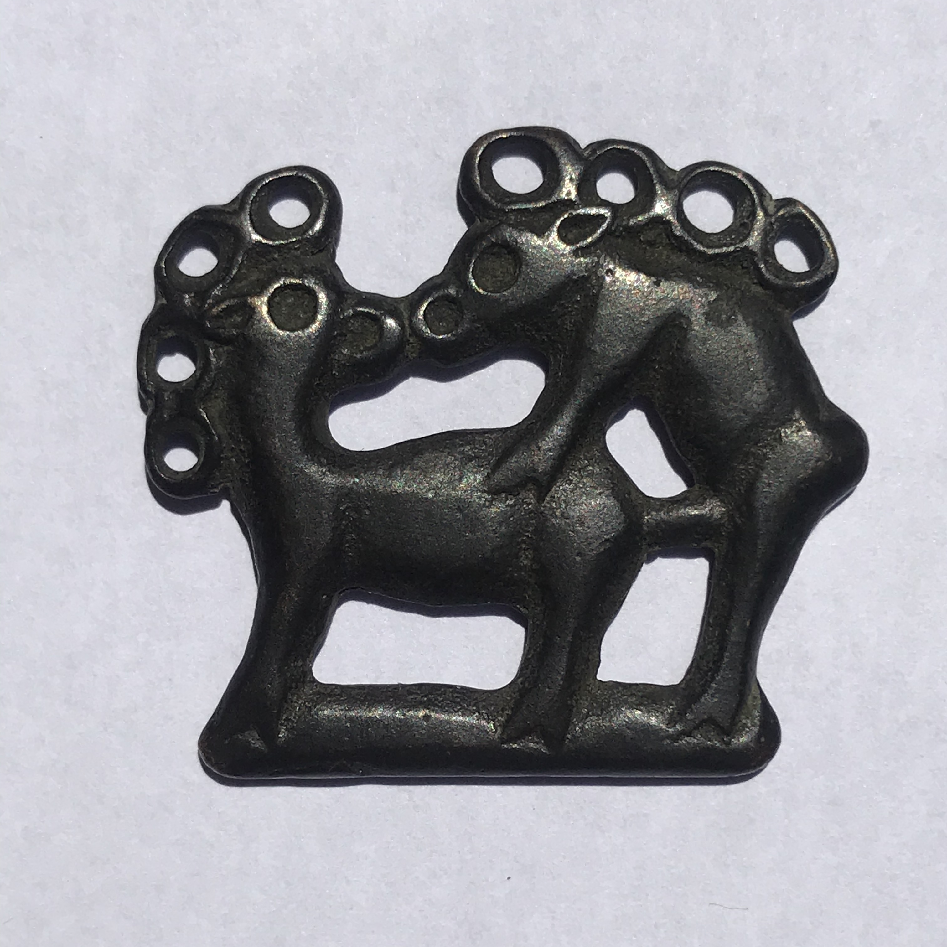 Plaque en bronze de deux cerfs copulant, datant du VIIe au VIe siècle av. J.-C. Le Dr Koos de Jong propos de théorie pour cette pièce : - Elle pourrait être une représentation du comportement homosexuel observé chez les cerfs par le peuple zhou. - Elle pourrait être utilisée par son propriétaire pour signifier la préférence sexuelle à ses contemporains. Le choix d'une représentation animalière serait lié à la prépondérance de la chasse dans l'économie locale et vivrière.